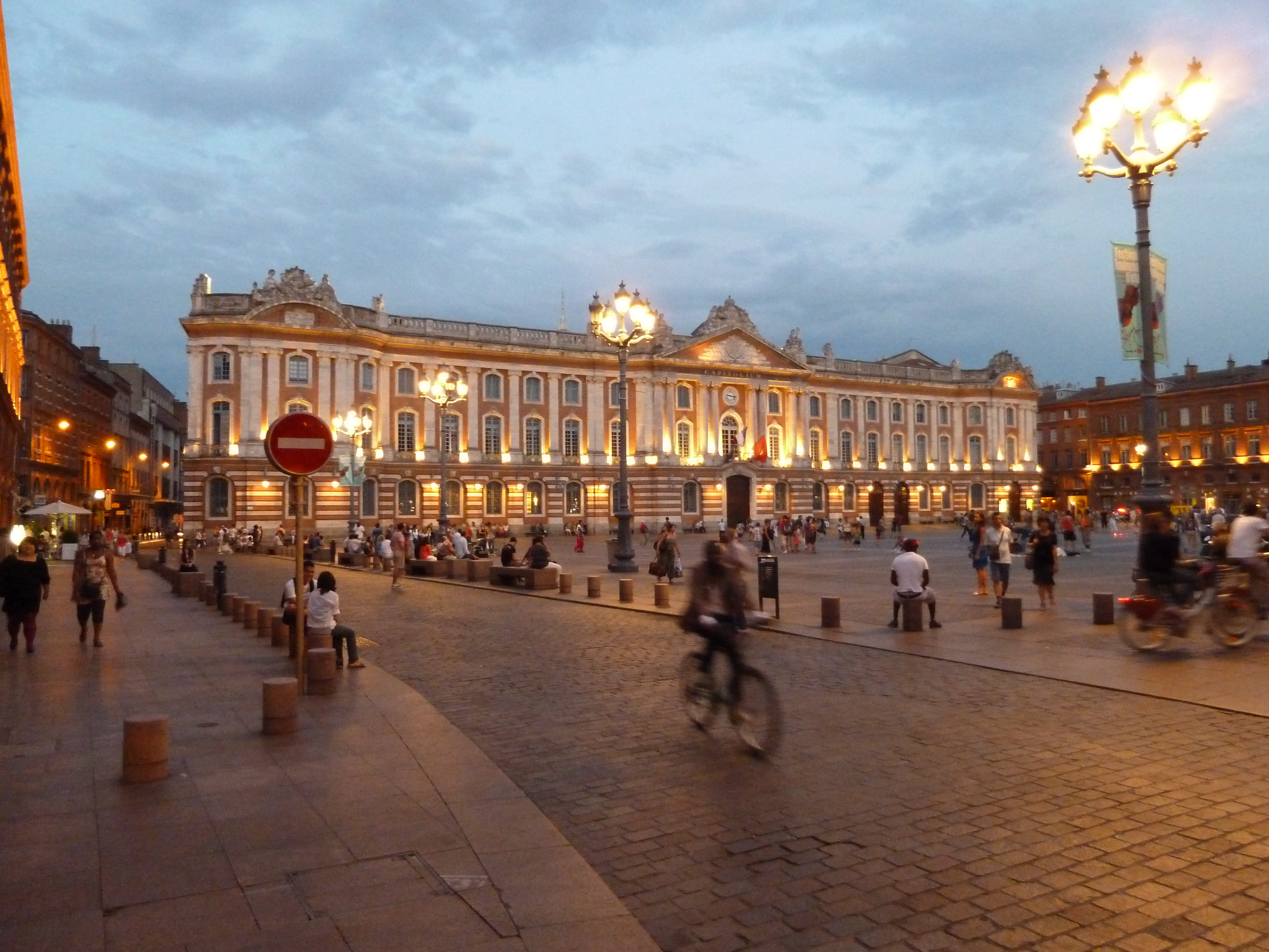 Capitole à Toulouse